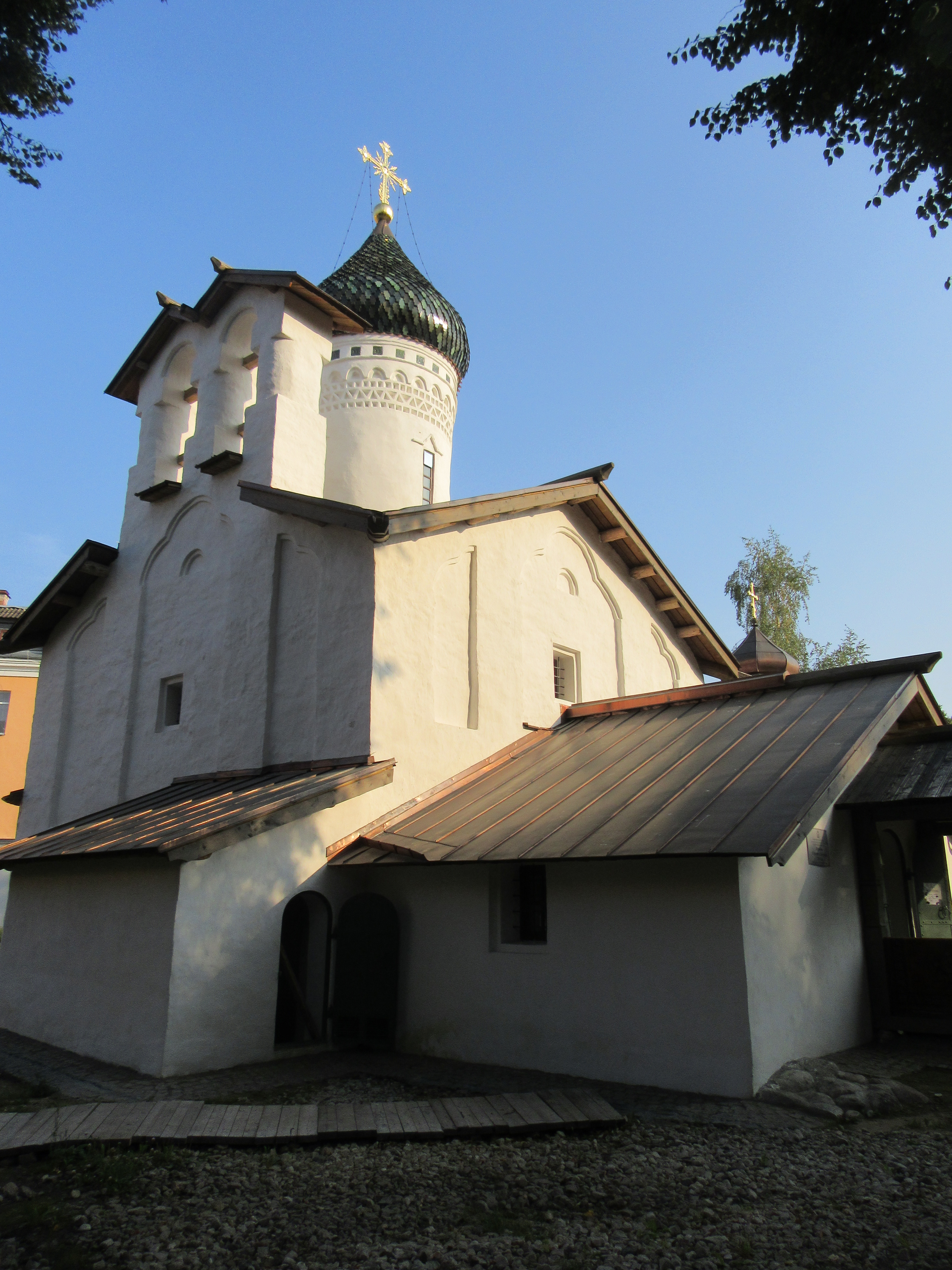 Vue au soleil couchant de l'église Saint-Serge-de-Zaloujé à Pskov